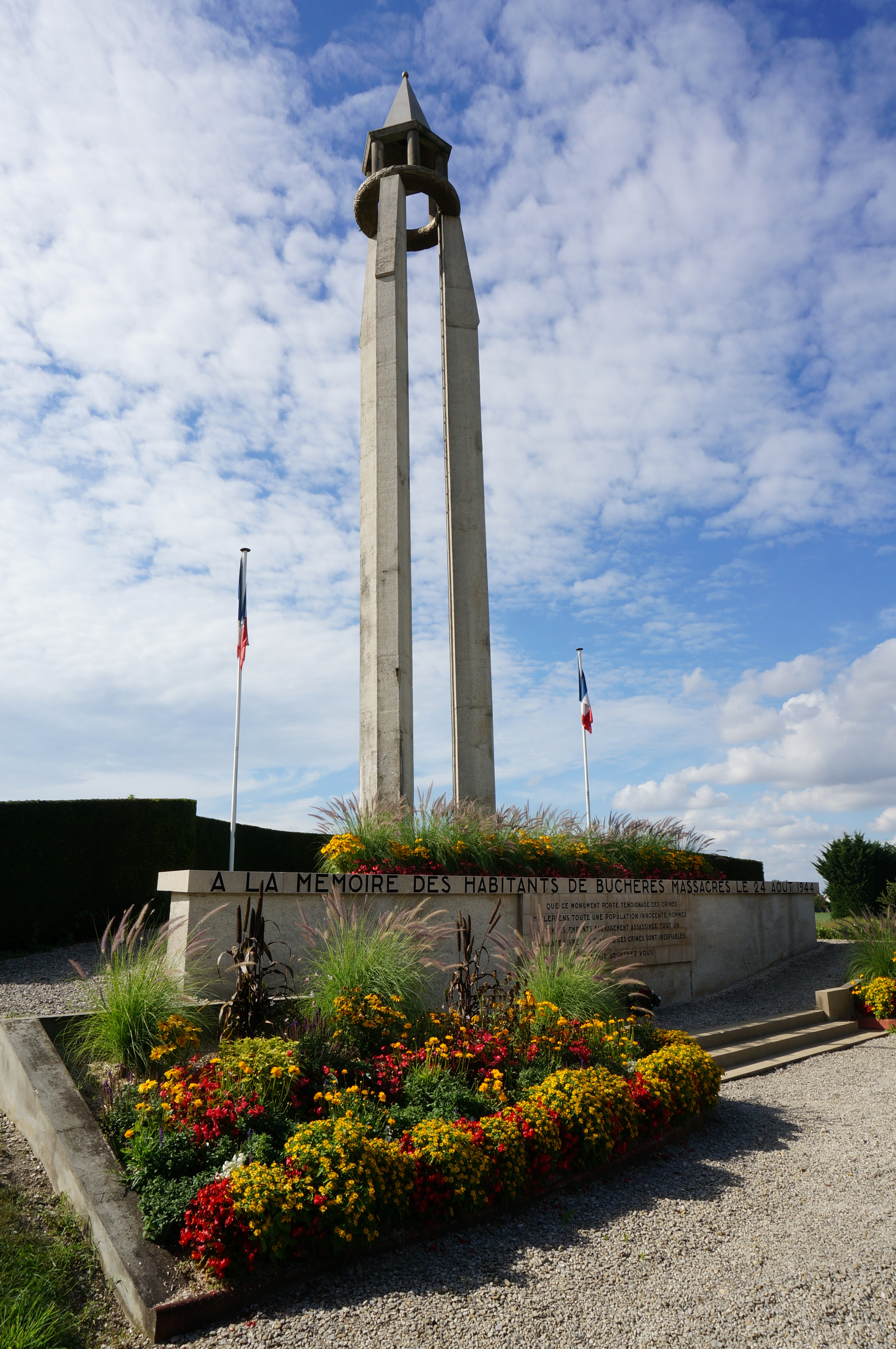 à Buchères.